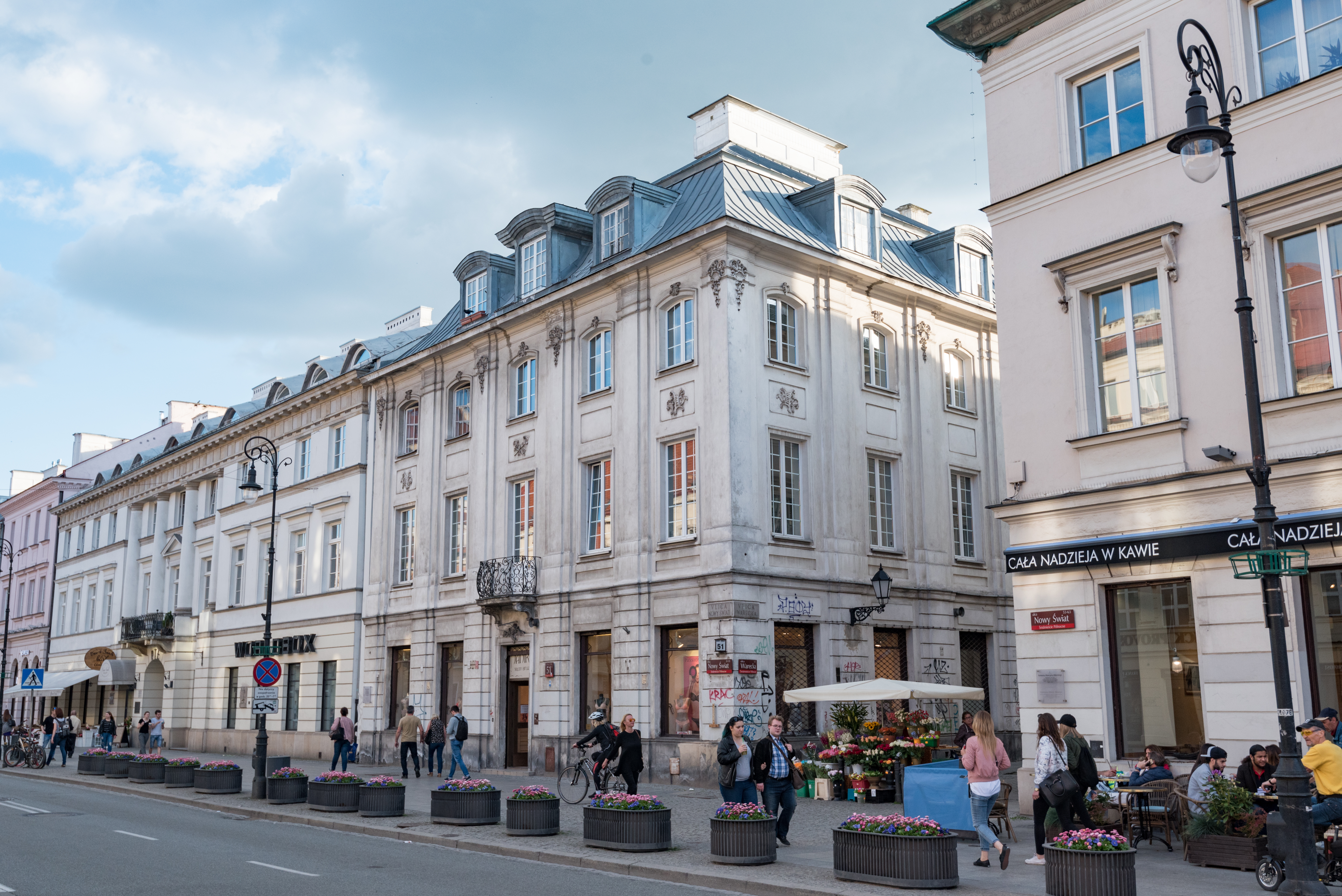 Warszawa, ul. Nowy Świat 49, 51